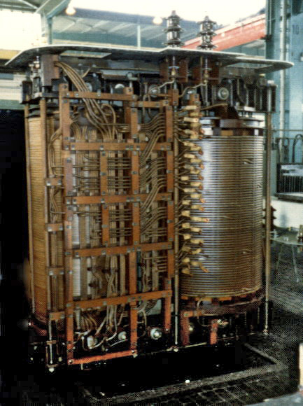 Trafo ohne Verkleidung